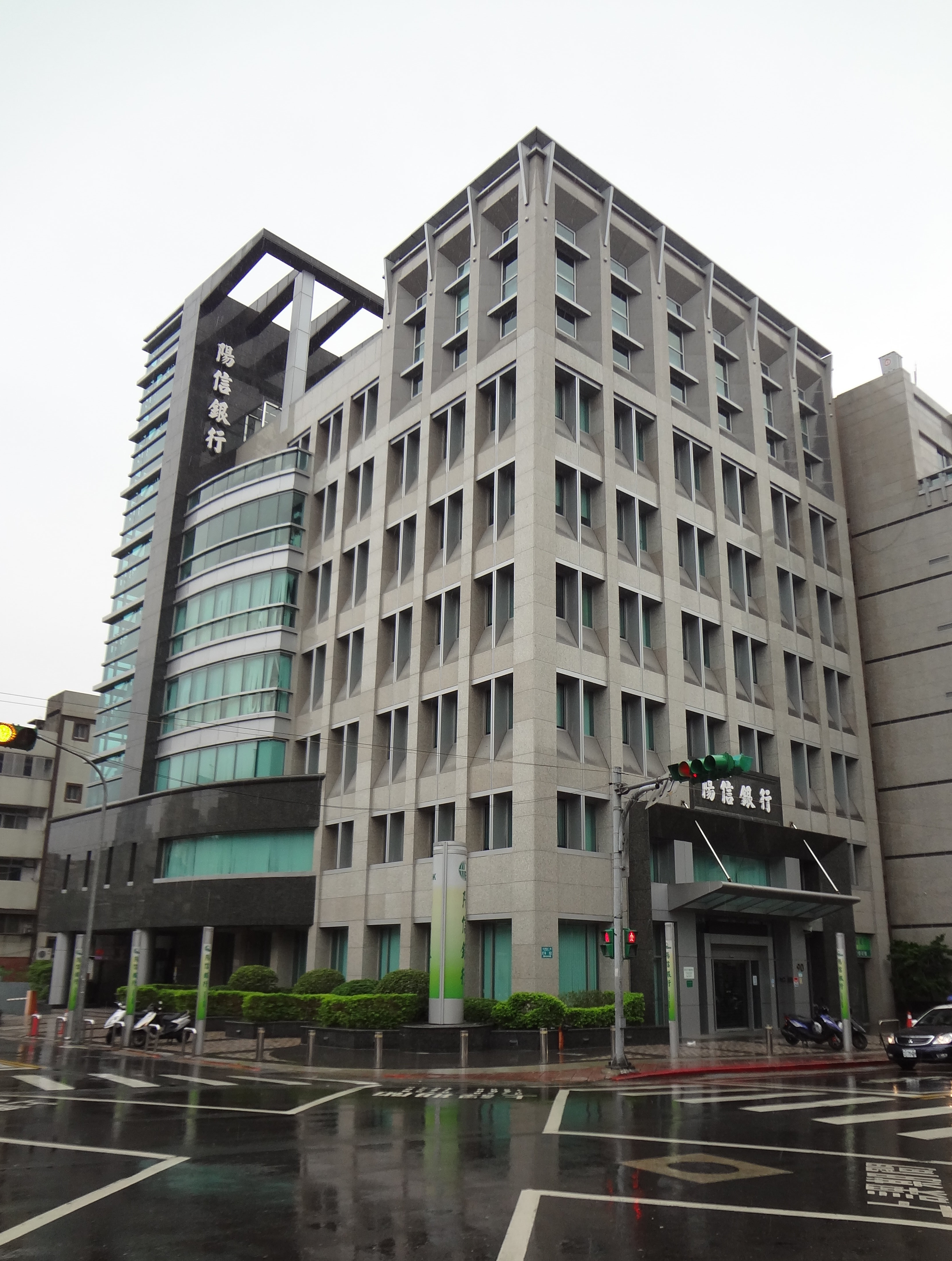 陽信商業銀行石牌分行，位於臺北市北投區石牌路一段90號。